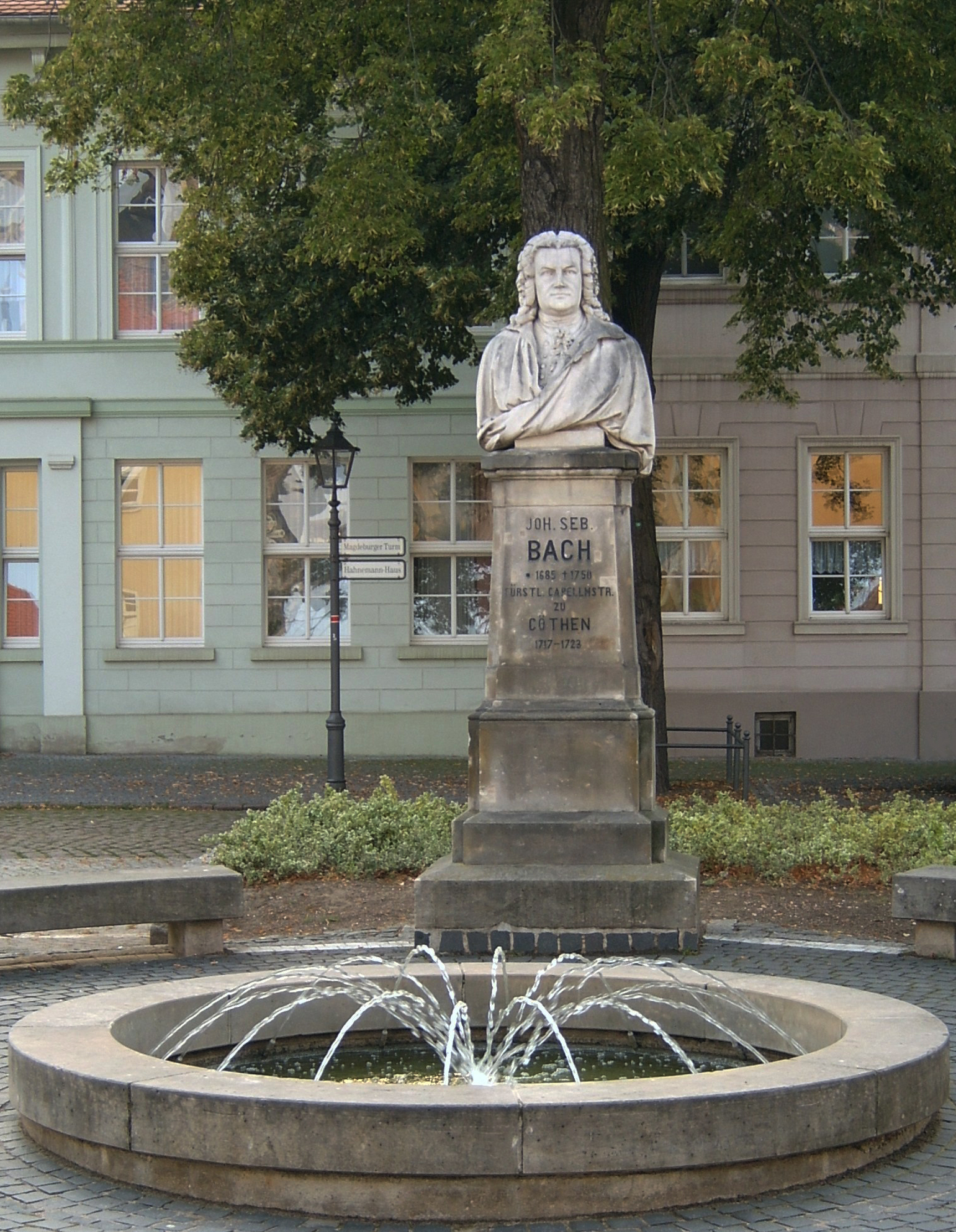 Denkmal an Johann Sebastian Bach in Köthen (Anhalt) auf dem Bachplatz. Das Denkmal wurde 1885 von dem Berliner Bildhauer Heinrich Pohlmann geschaffen.